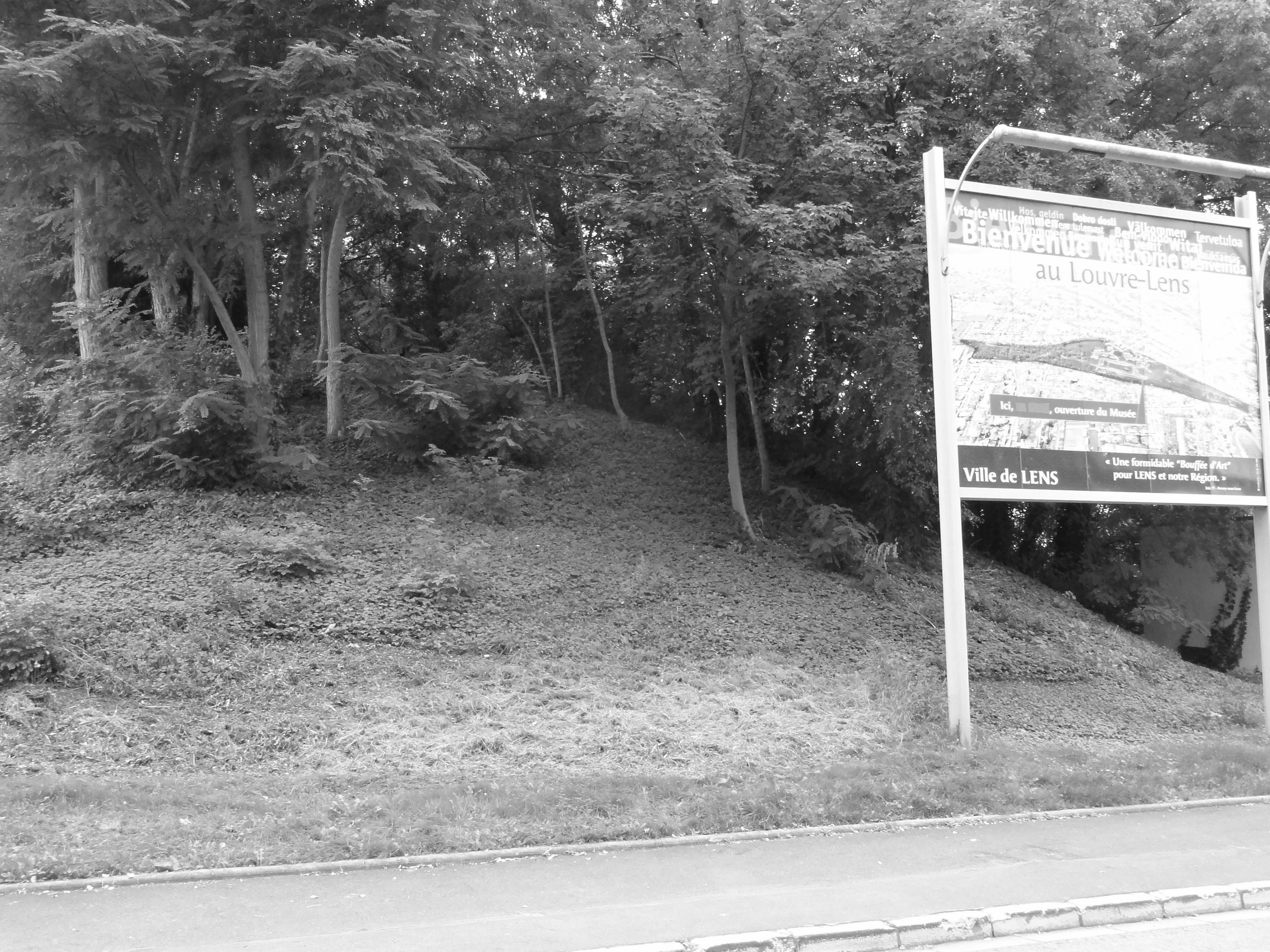 Terril n° 68A dit Cavalier du 9 de Lens, fosse n° 9 de la Compagnie des mines de Lens dans le bassin minier du Nord-Pas-de-Calais, Lens, Pas-de-Calais, Nord-Pas-de-Calais, France.